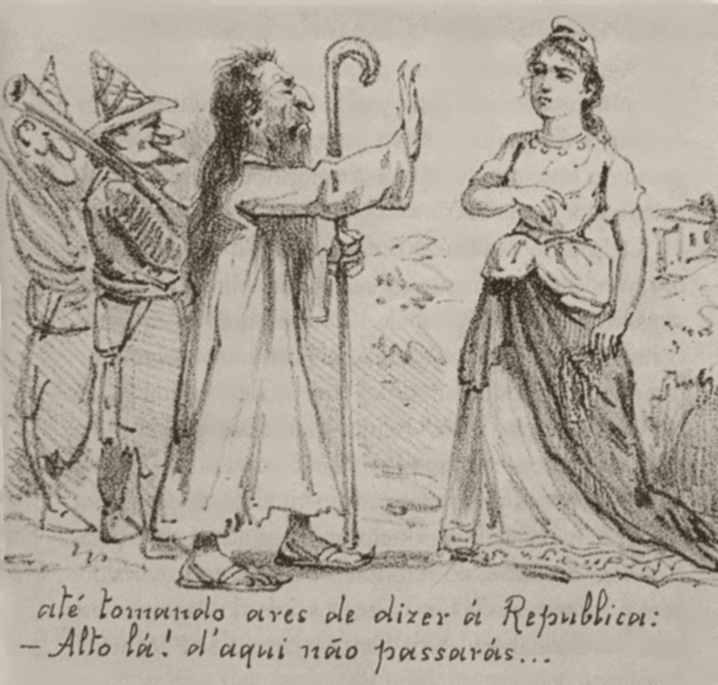 Desenho de Angelo Agostini, Antônio Conselheiro rechaça a República, in:Revista Ilustrada c. 1896